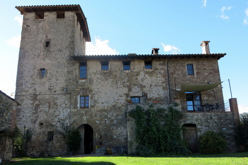 Torre de Bianya a la Vall de Bianya_ Garrotxa - Catalunya